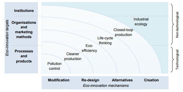 Relações conceituais entre manutafura sustentável e ecoinovação